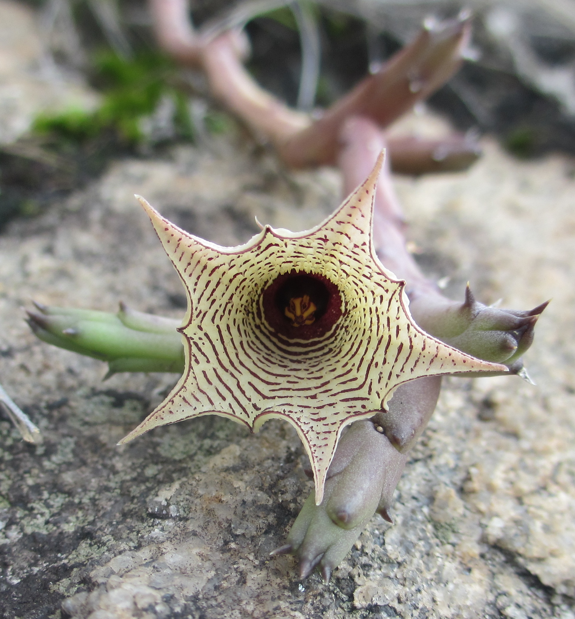 On Mount Zembe, Central Mozambique.